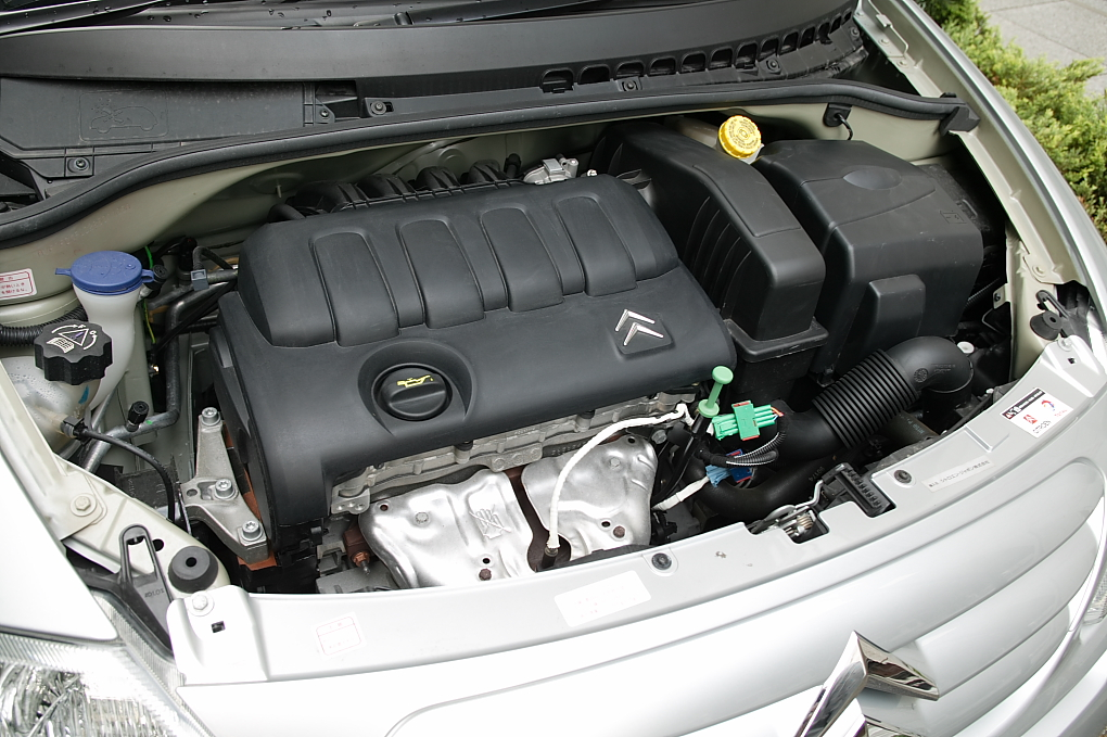 Citroën C3 ET5 1.4l 16V Petrol engine